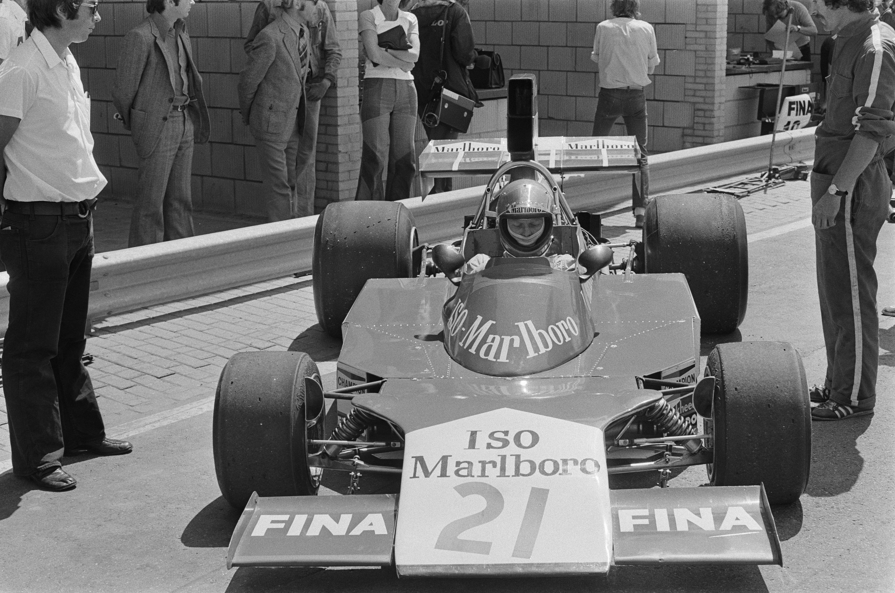 Training Grand Prix op Zandvoort; Gijs van Lennep in actie.